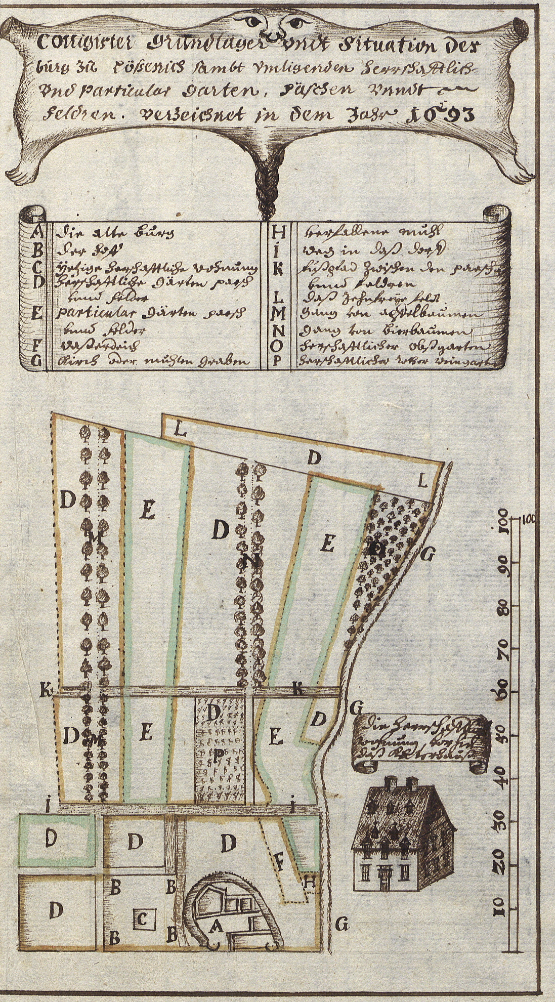 Zeitgenössischer Lageplan der Burgruine Lösnich aus dem Jahre 1693